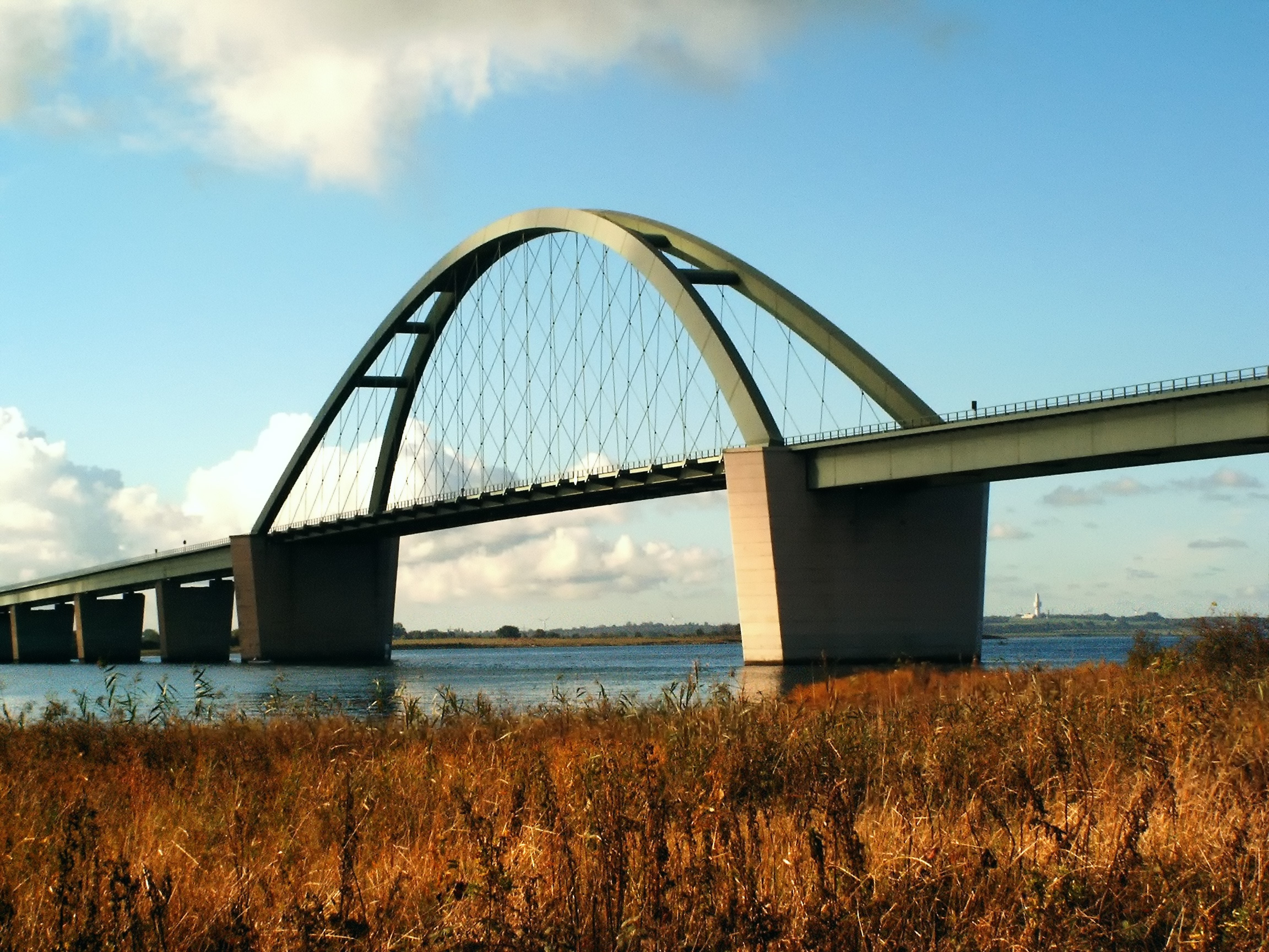 Fehmarnsundbrücke vom Wulfener Hals aus